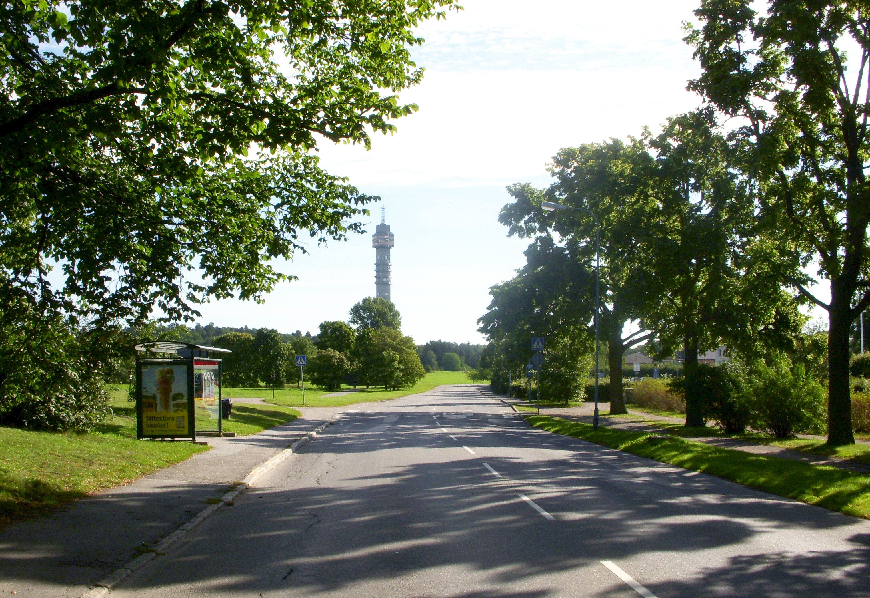 Djurgårdsbrunnsvägen på Östermalm i Stockholm, österut med Kaknästornet i bakgrunden